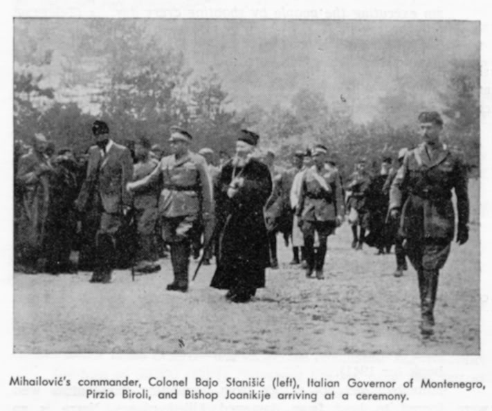 Srpskohrvatski / српскохрватски: Četnički vođa Bajo Stanisić, okupacioni guverner Pirzio Biroli i crnogorski mitropolit Joanikije Lipovac.